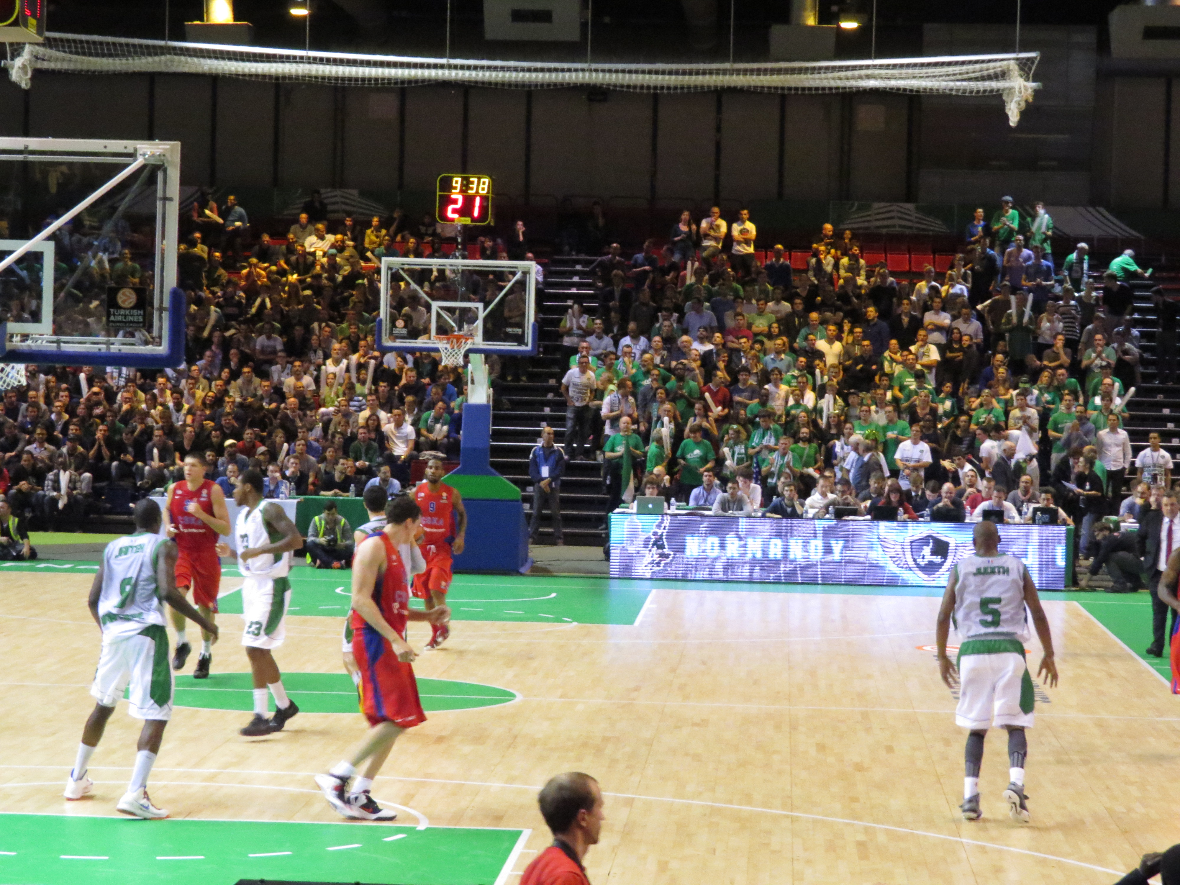 Match d'Euroligue entre Nanterre et le CSKA Moscou à la halle Carpentier (Paris). Victoire du CSKA 62-59.